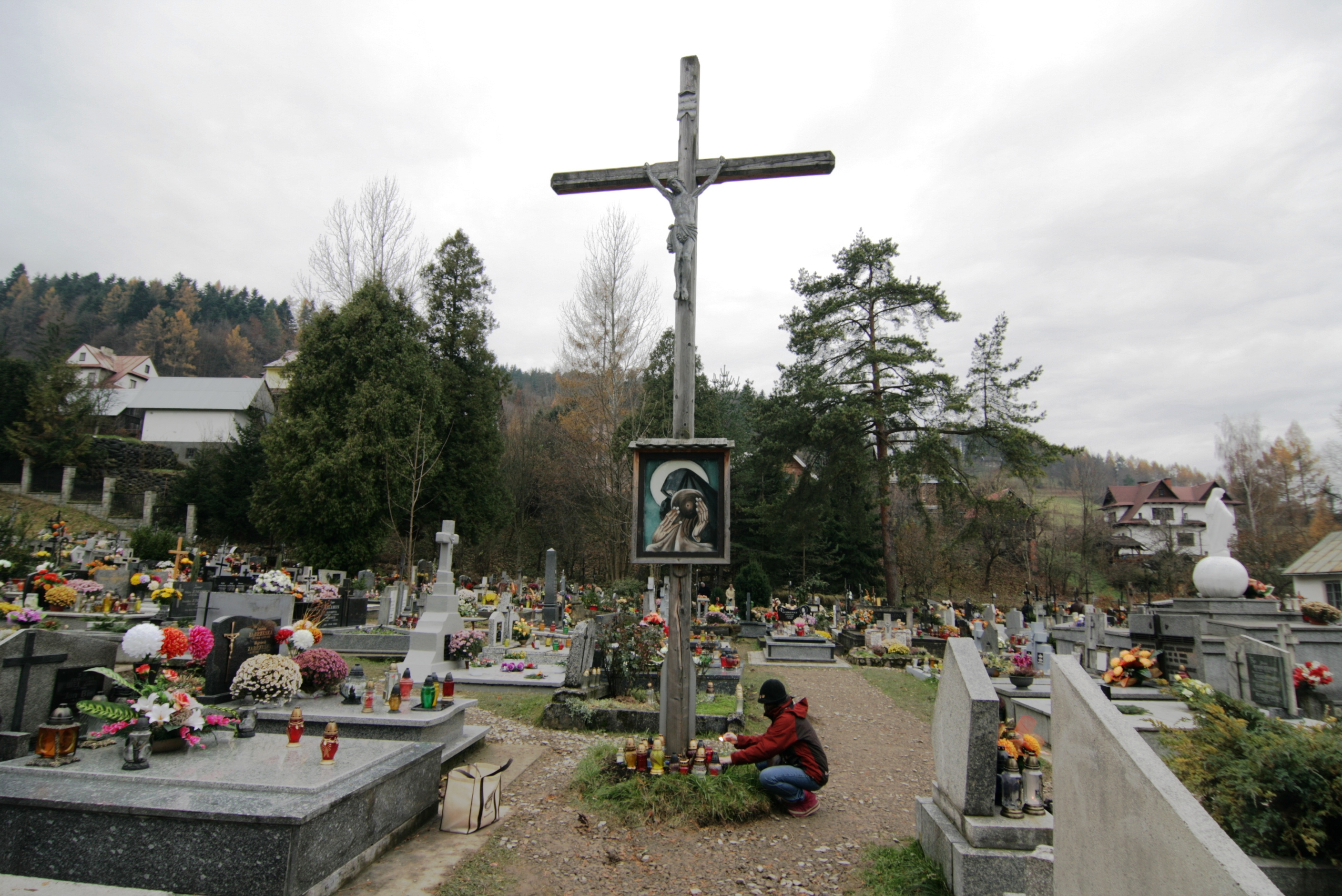 Krzyż poświęcony pomordowanym na Wschodzie na nowym cmentarzu w Krościenku nad Dunajcem